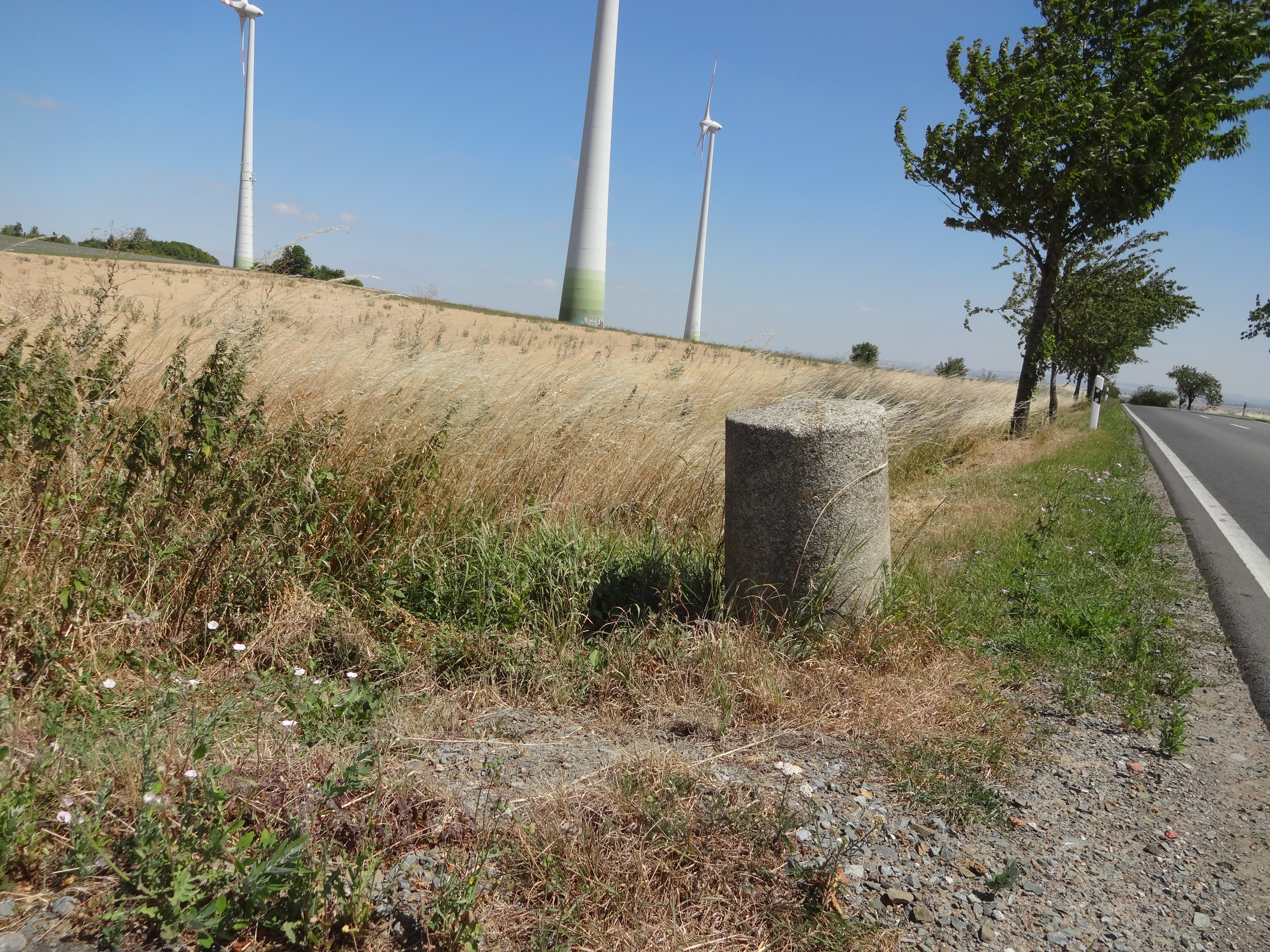 Denkmalgeschützter preußischer Distanzstein bei Badersleben